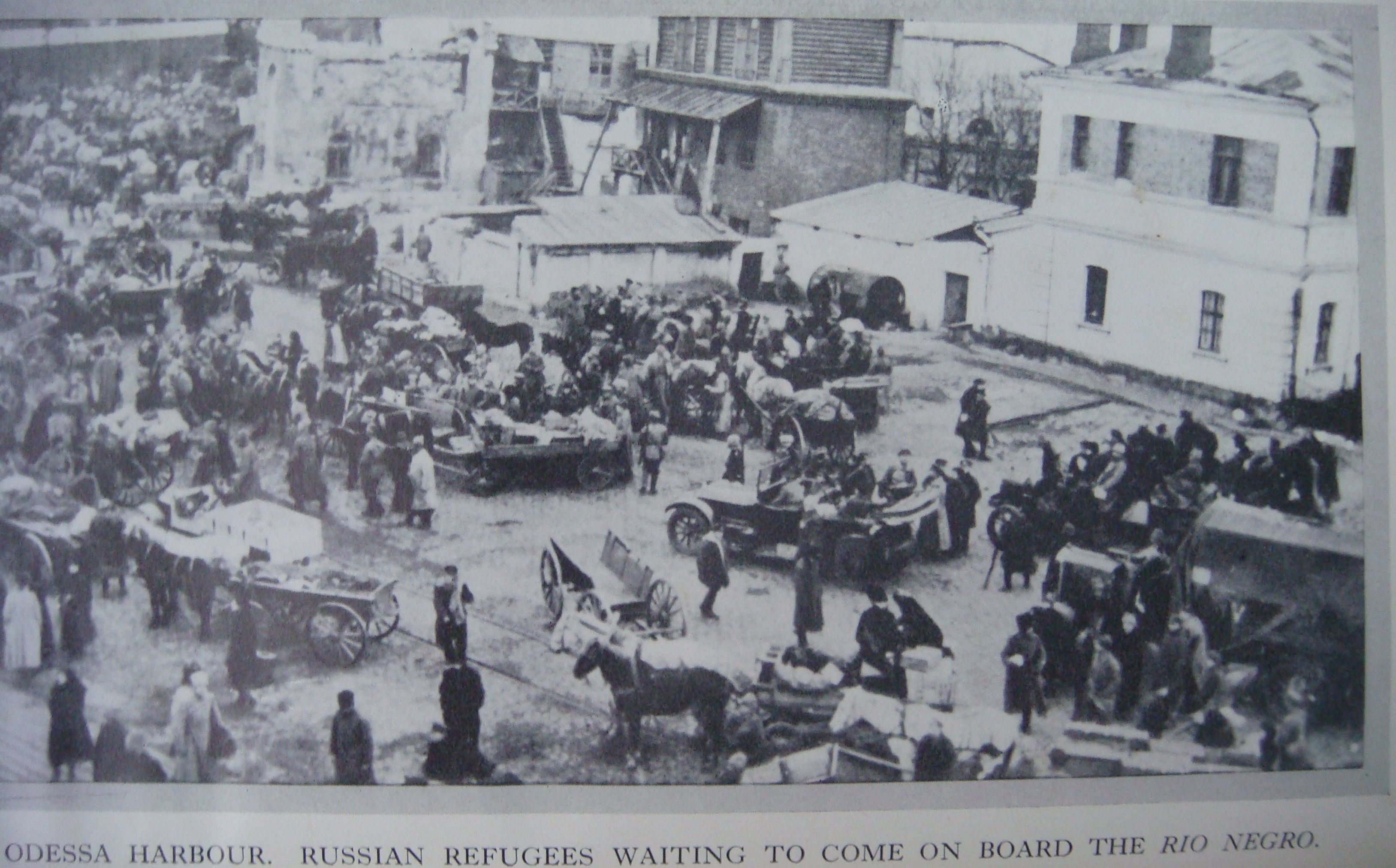 Сцены одесской эвакуации. Февраль 1920 г.